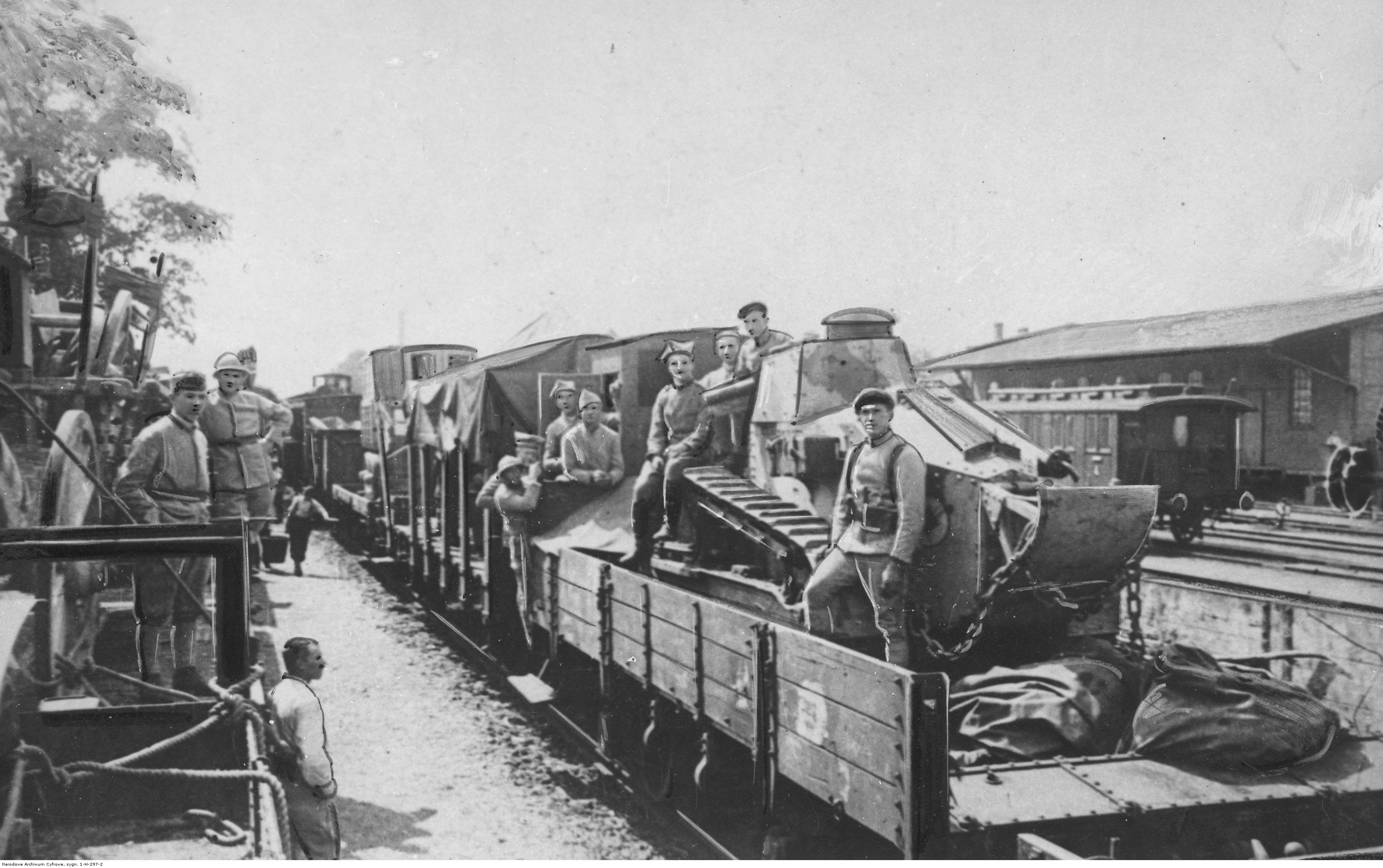 Transport oddziałów armii generała Józefa Hallera z Francji do Polski; 1919 r. Żołnierze na platformie kolejowej przewożącej czołg Renault FT-17. Koncern Ilustrowany Kurier Codzienny - Archiwum Ilustracji. Sygnatura: 1-H-297-2